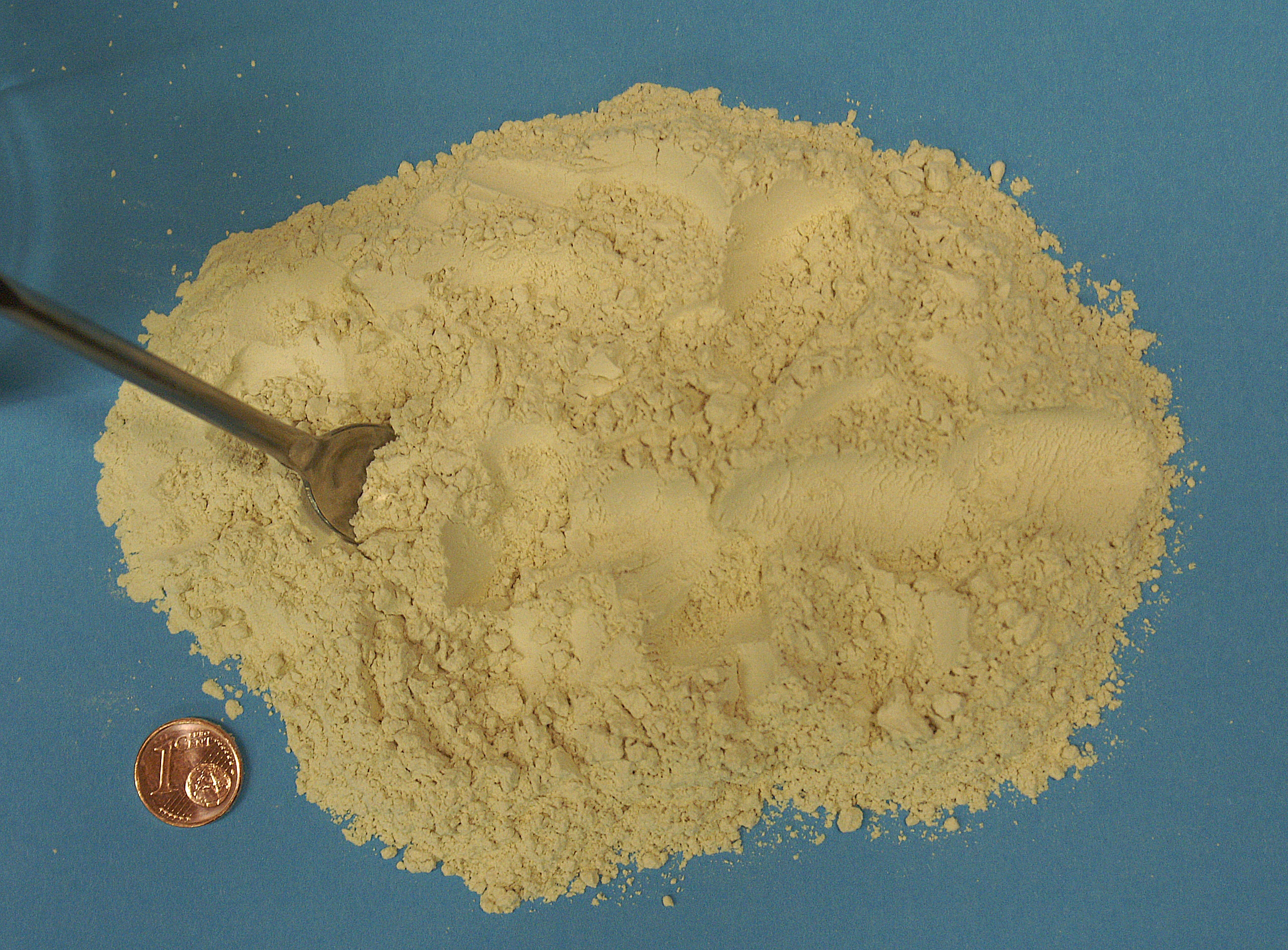 Kohlensaurer Kalk (Herkunft: Schotterwerk auf der Schwäbischen Alb) mit 90 % CaCO3 und 2 % MgCO3